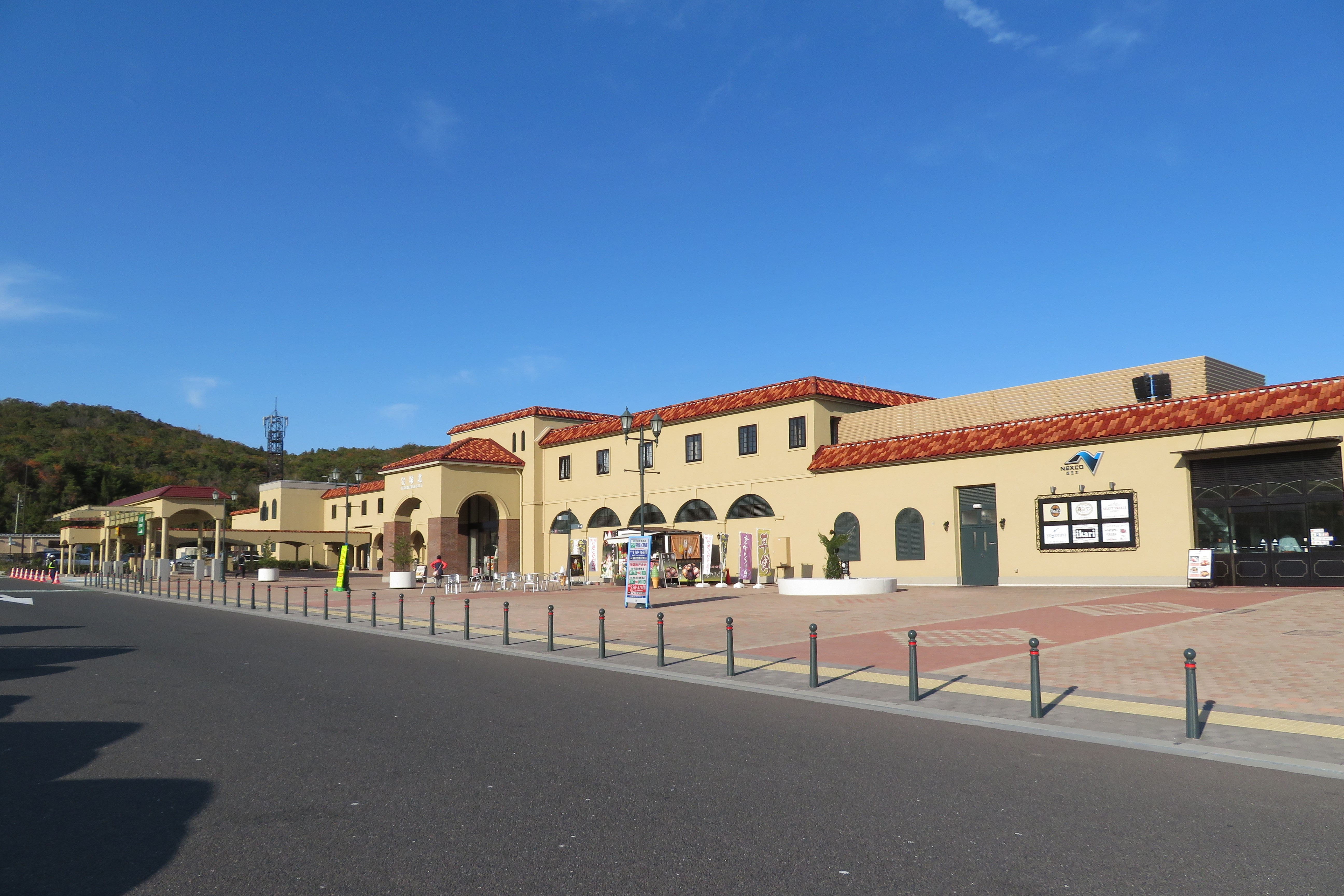 宝塚北サービスエリア(上り線側)